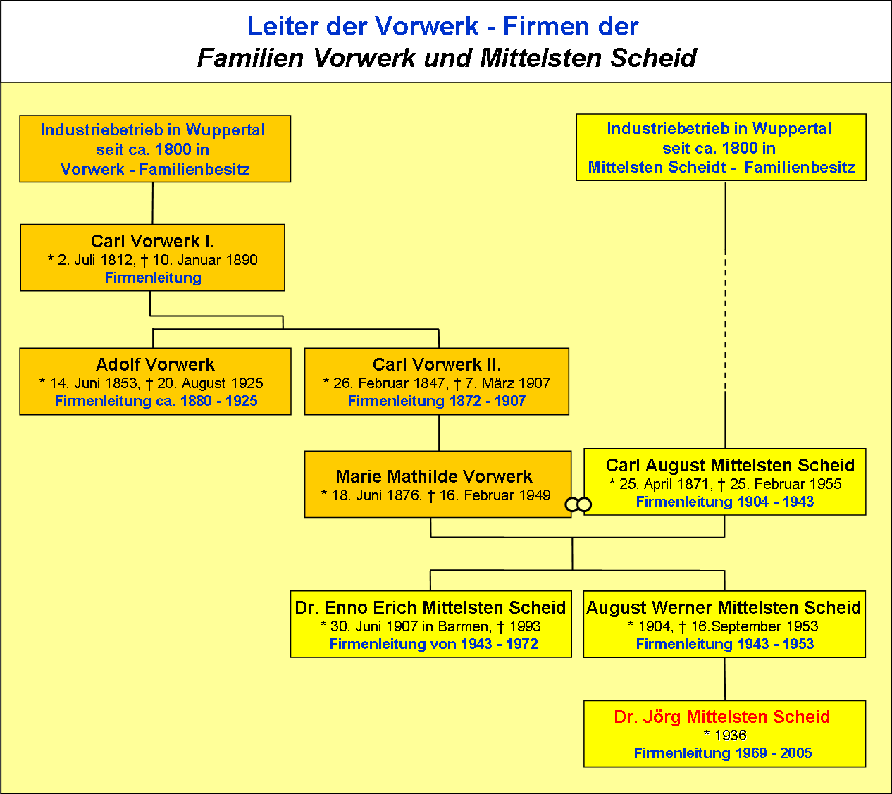 Vorwerk Stammbaum - Dr. Jörg Mittelsten Scheid ver.3